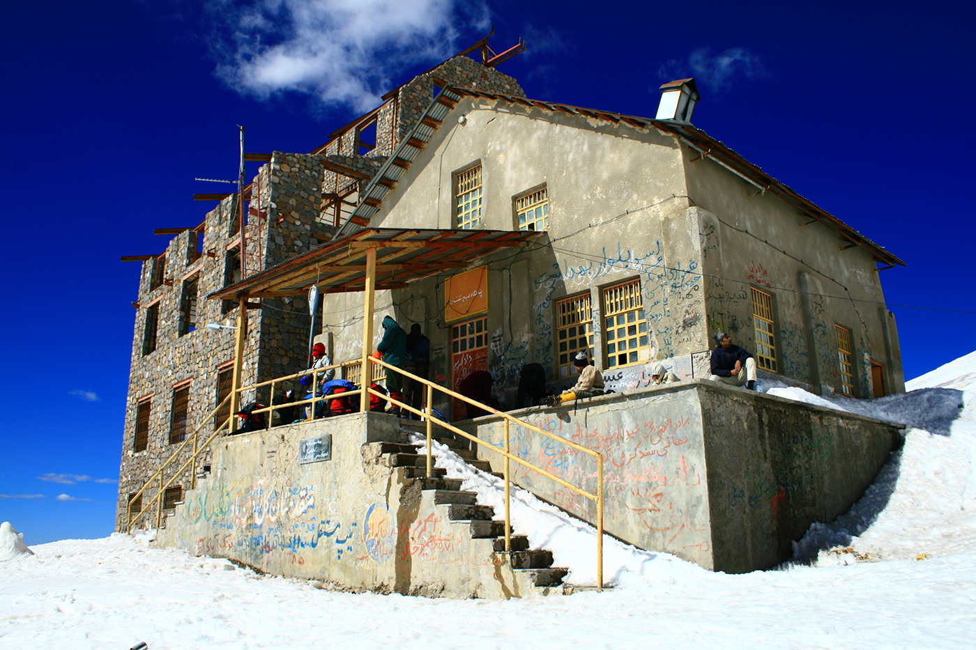 پناهگاه تفتان